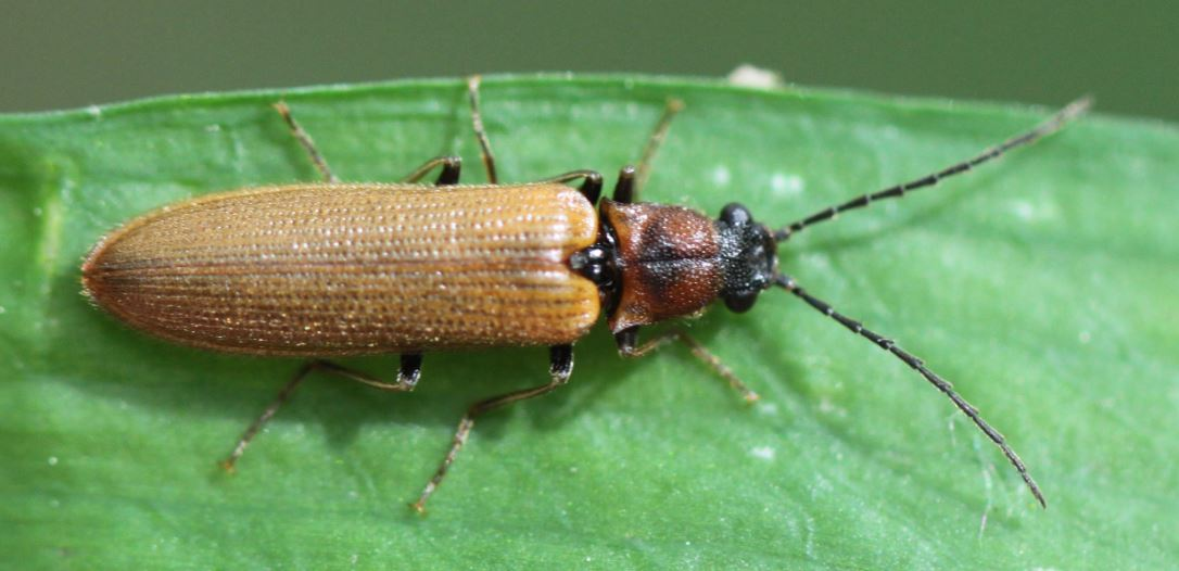 Denticollis linearis auf einem Bärlauchblatt; am 3. Mai 2019 in einem Wald nahe Walldorf/Baden